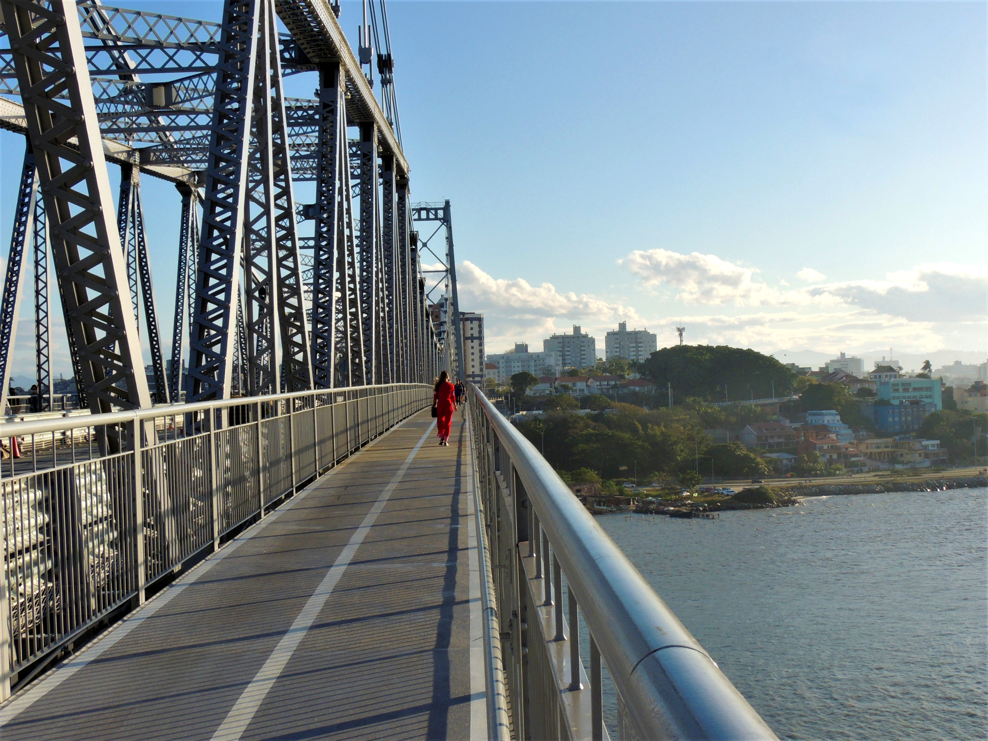 A Ponte Hercílio Luz é uma ponte pênsil localizada em Florianópolis (Nossa Senhora Do Desterro), no estado brasileiro de Santa Catarina. É a maior ponte suspensa do Brasil, com 821 metros - sendo a maior ponte pênsil sustentada por um sistema de barras de olhal ainda existente, e possui o 132º maior vão pênsil do mundo, com 339 metros. Apelidada de "Velha Senhora" é o símbolo mais famoso da cidade e do estado, sendo a imagem mais reconhecida de ambos. A ponte foi projetada e construída durante o governo de Hercílio Luz para ser a primeira ligação terrestre entre a ilha e o continente. O idealizador não viu seu sonho ser concluído, pois morreu em 1924, doze dias depois de inaugurar uma réplica de madeira. O projeto é de autoria dos engenheiros norte-americanos Robinson e Steinman, e todo o material nela empregado foi trazido dos Estados Unidos, tendo sido construída por equipe composta de dezenove técnicos especializados norte-americanos e operários catarinenses. Após anos fechada e apenas sendo mantida, uma parceria entre o Governo Federal, Governo do Estado e a Prefeitura de Florianópolis em 2005 proporcionou o início das obras de restauração da ponte Hercílio Luz. Em dezembro de 2019 o governo do estado confirmou a reabertura do trânsito na ponte, o que aconteceu no dia 30 de dezembro do mesmo ano. O fim das obras, entretanto, só aconteceu em 2020, com a retirada das estruturas auxiliares sob o vão central.